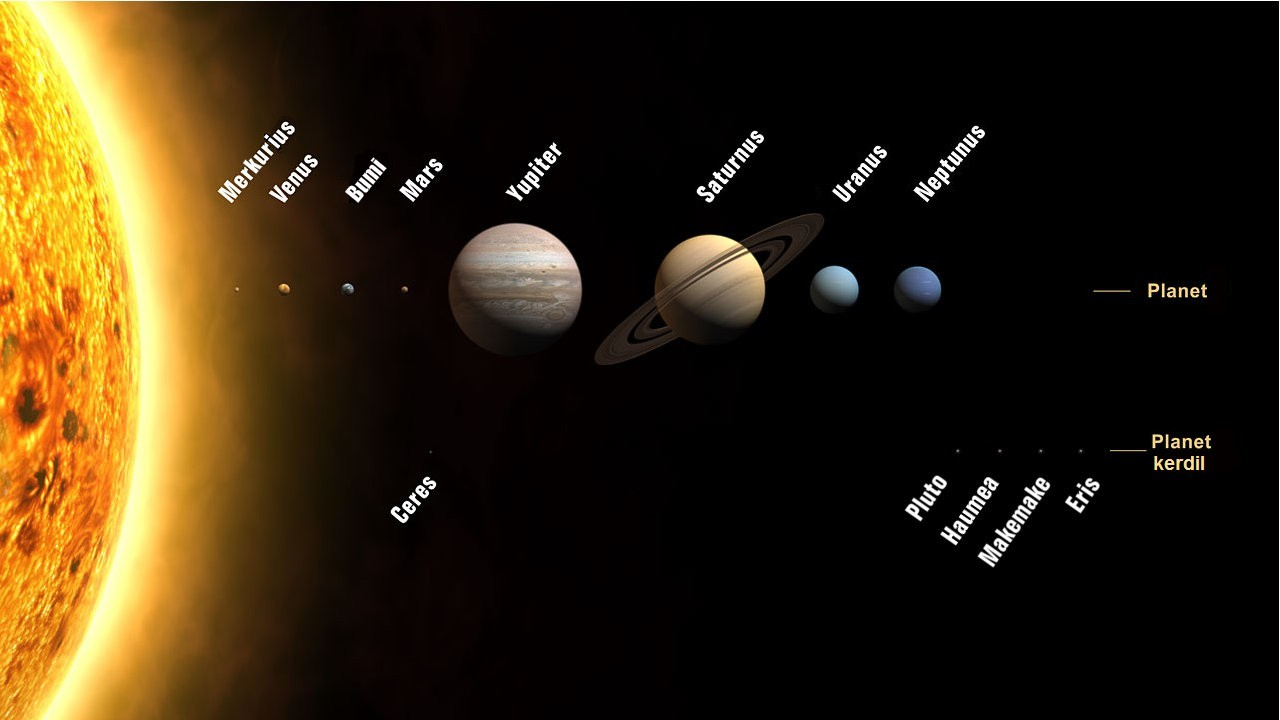 Planet dan planet kerdil dalam tata surya